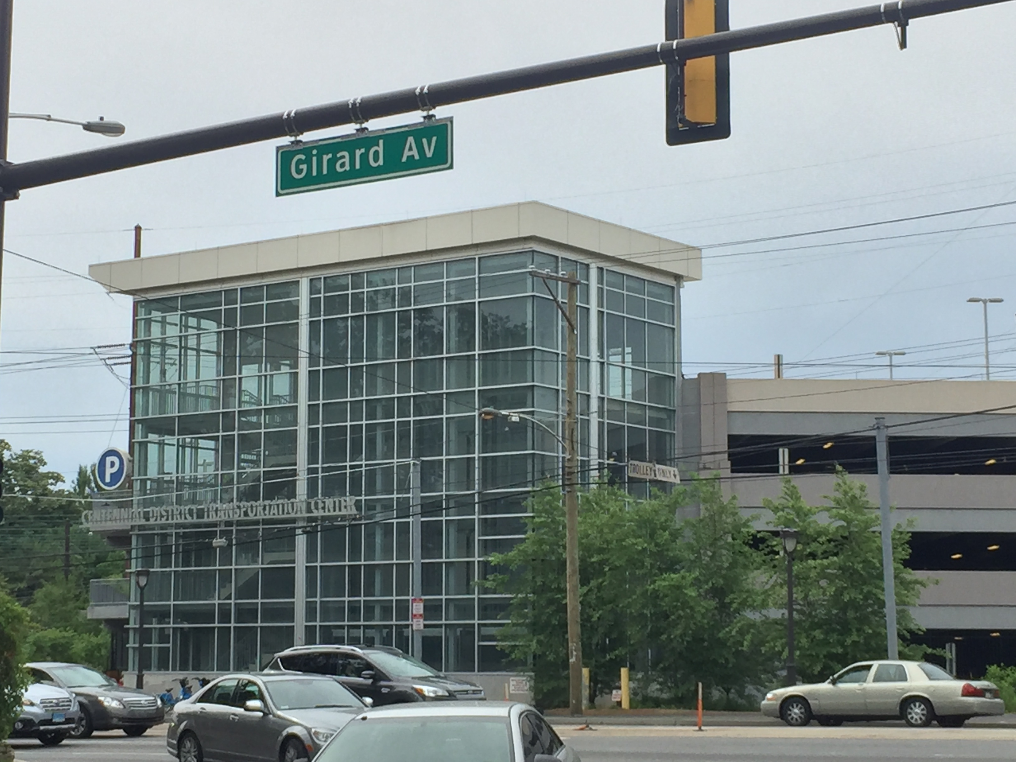 Centennial District